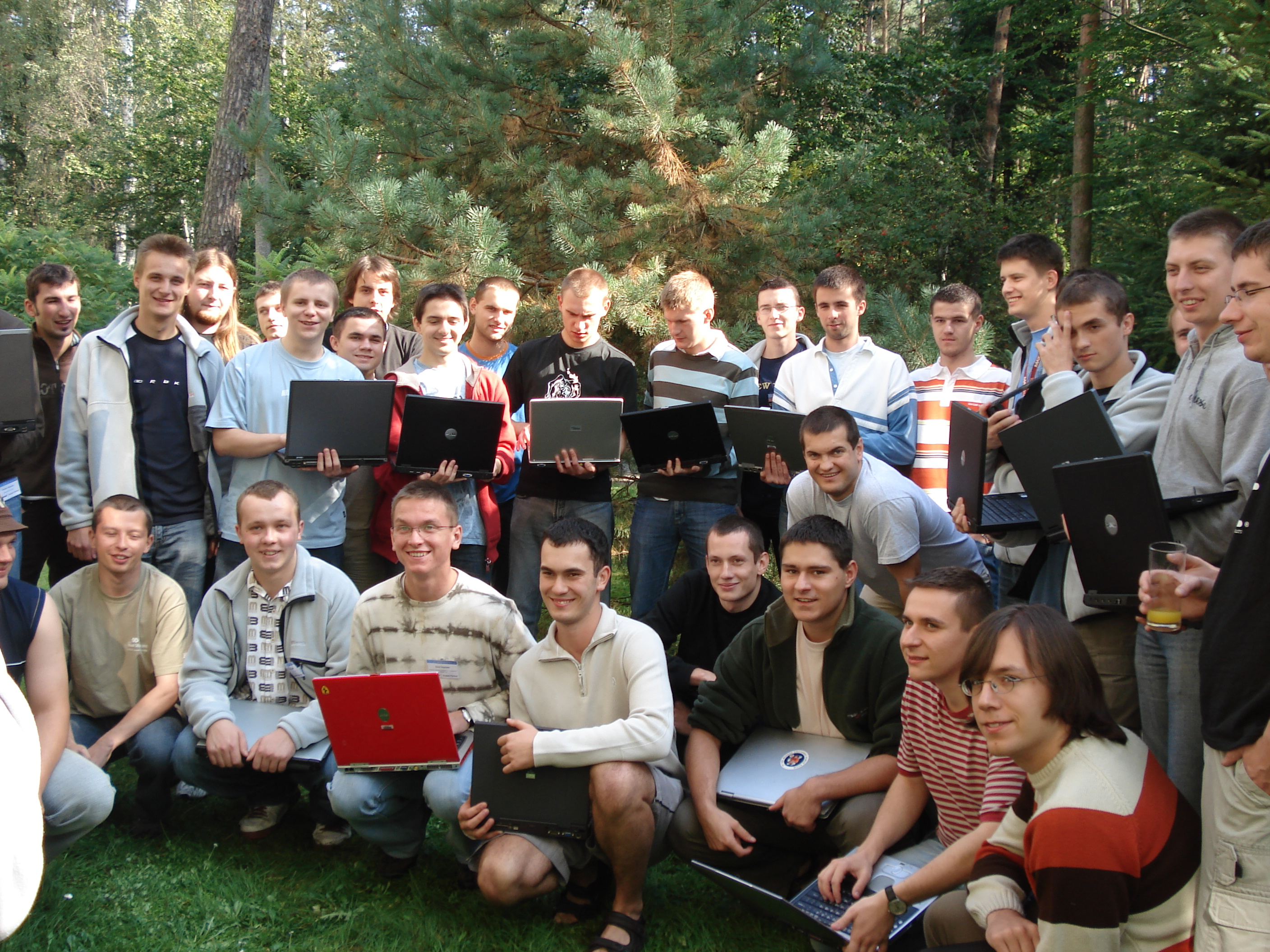 Student Partnerzy z Polski (21 września 2006).